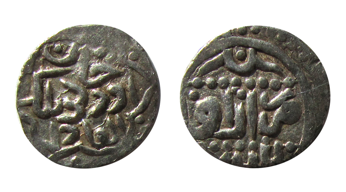 Найден в 2010 году составе большого клада на территории Воронежской области